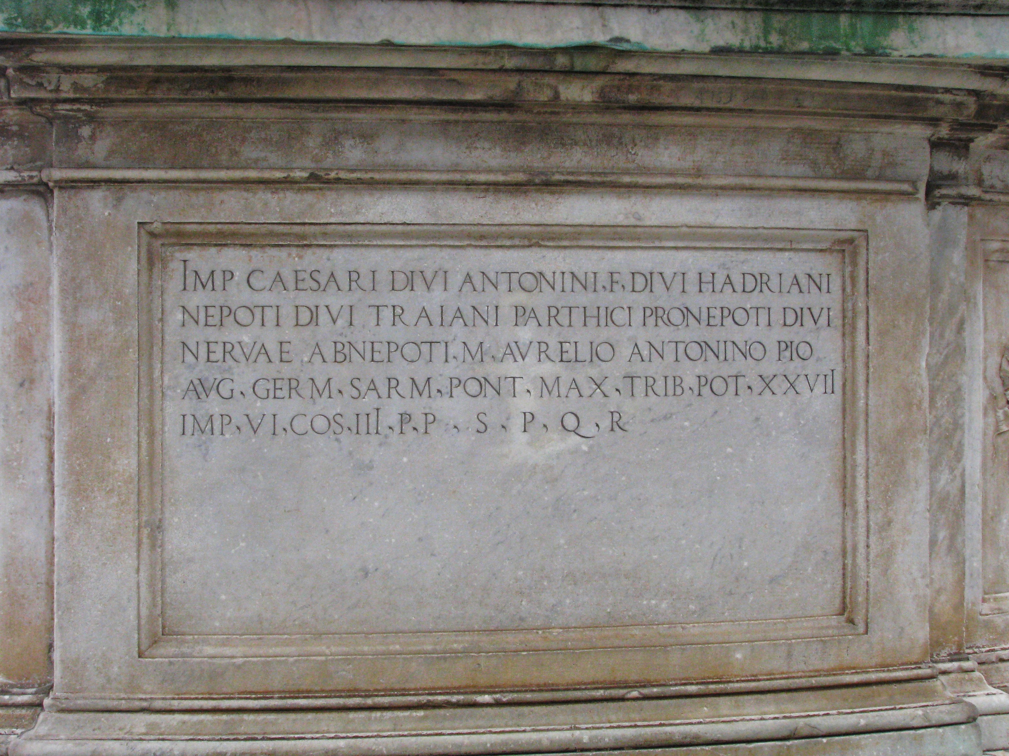 Reiterstatue Marc Aurel - Sockelinschrift links (in Blickrichtung des Kaisers)